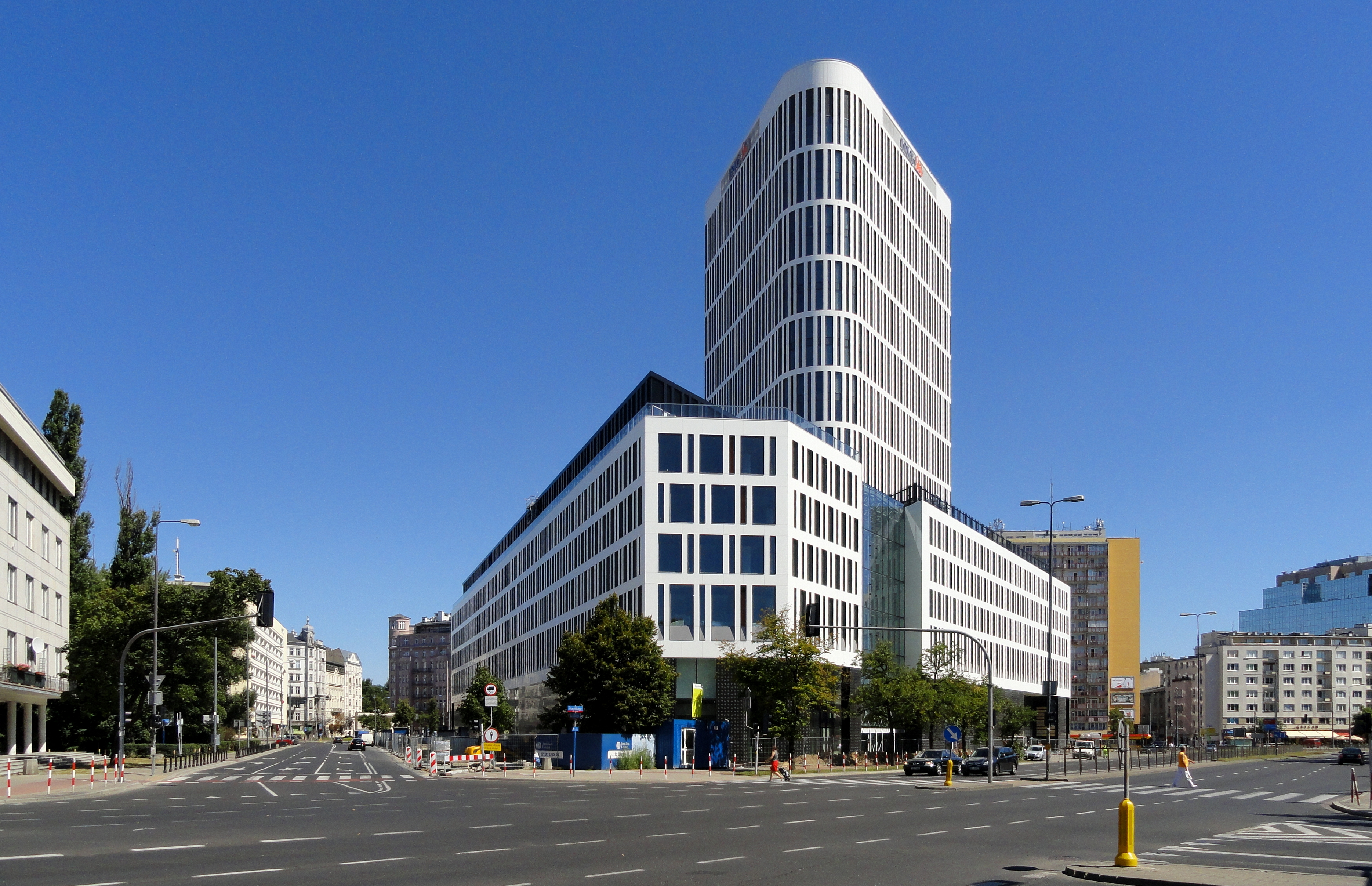 Plac Unii